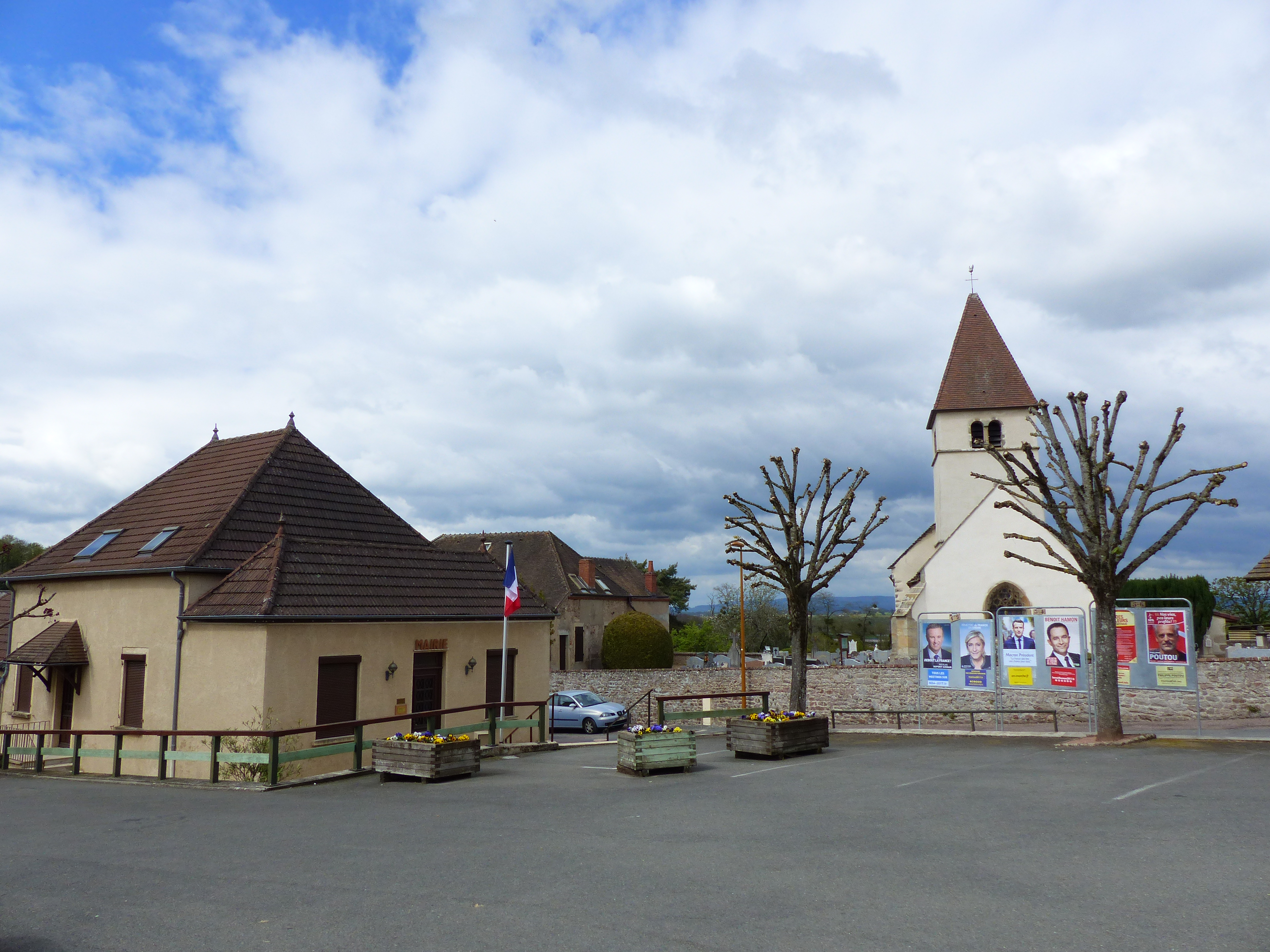 Mairie et Eglise de Saint-Laurent-d'Andenay dans le 71. On peut voir les affiches électorales de la présidentielle.